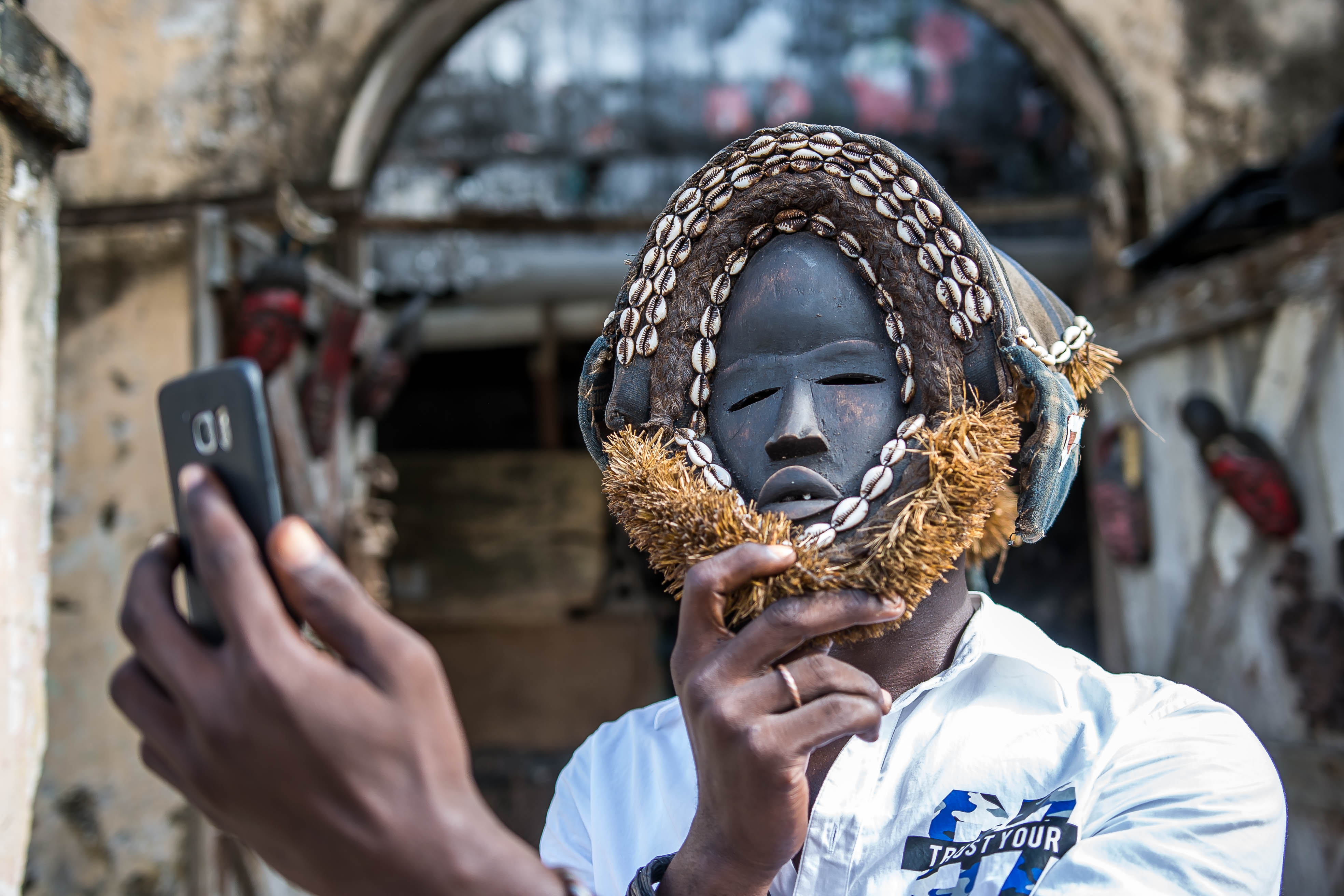 Un jeune vendeur de masques se faisant un selfie avec un smartphone pour mettre en valeur son masque This is an image with the theme "Africa on the Move or Transport" from: Ivory Coast